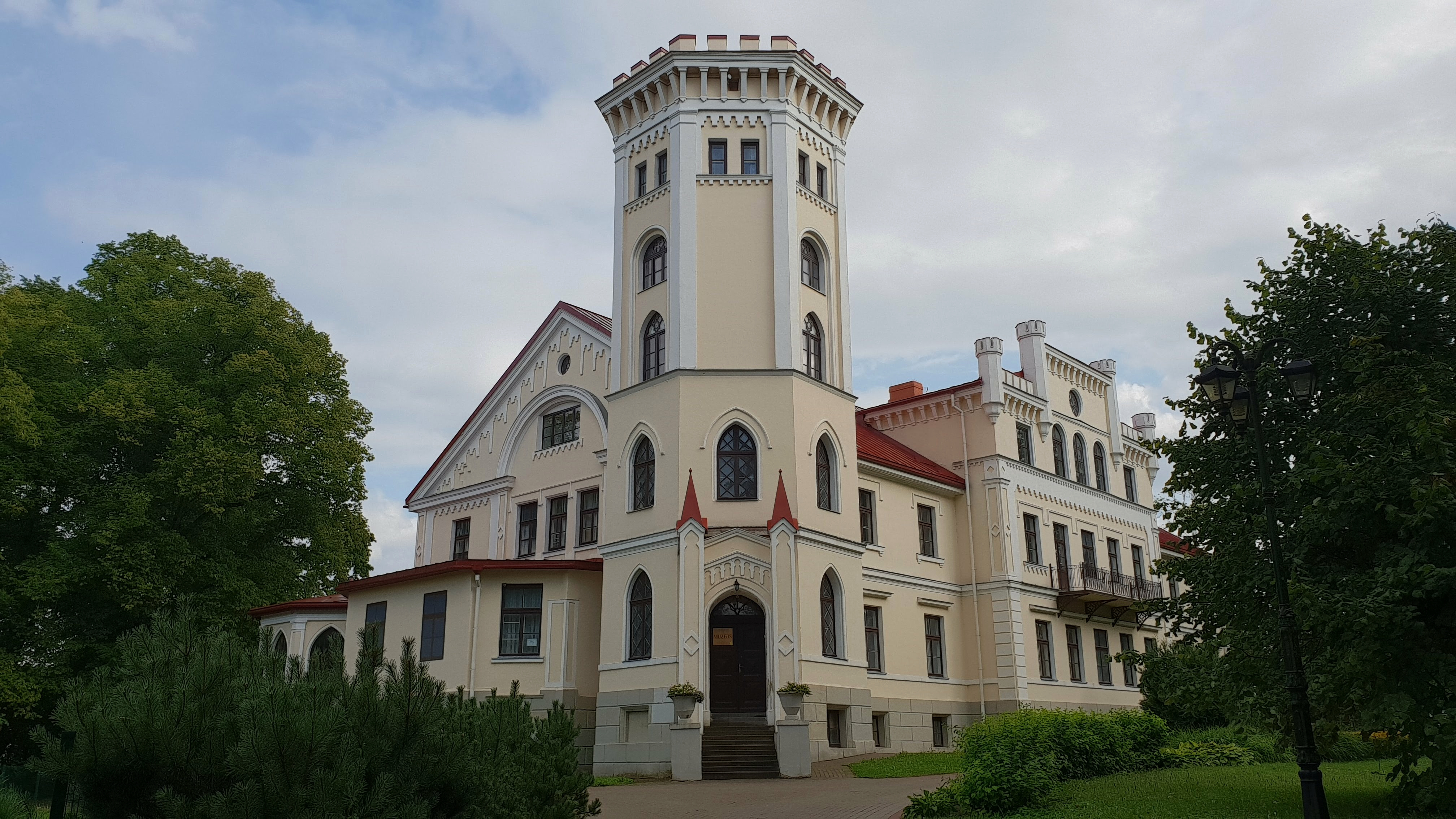 Lizumsi mõisa peahoone 2018. aastal